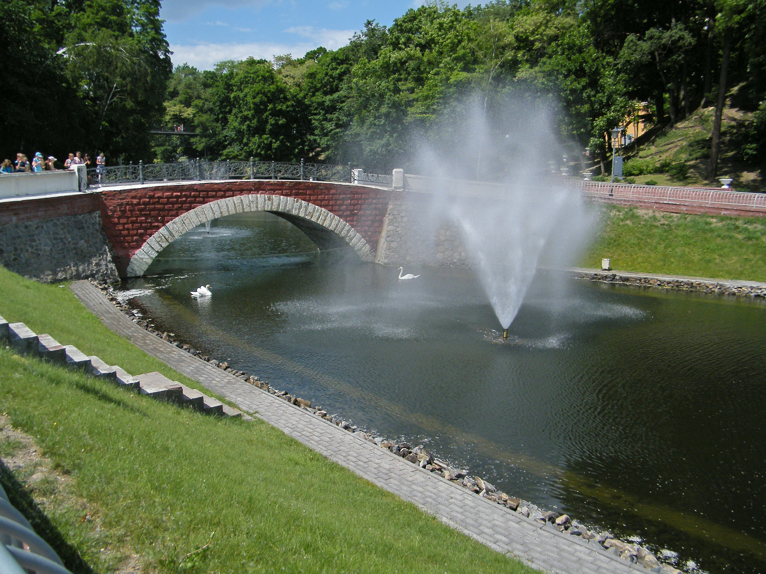 Современный вид ручья Гомеюк